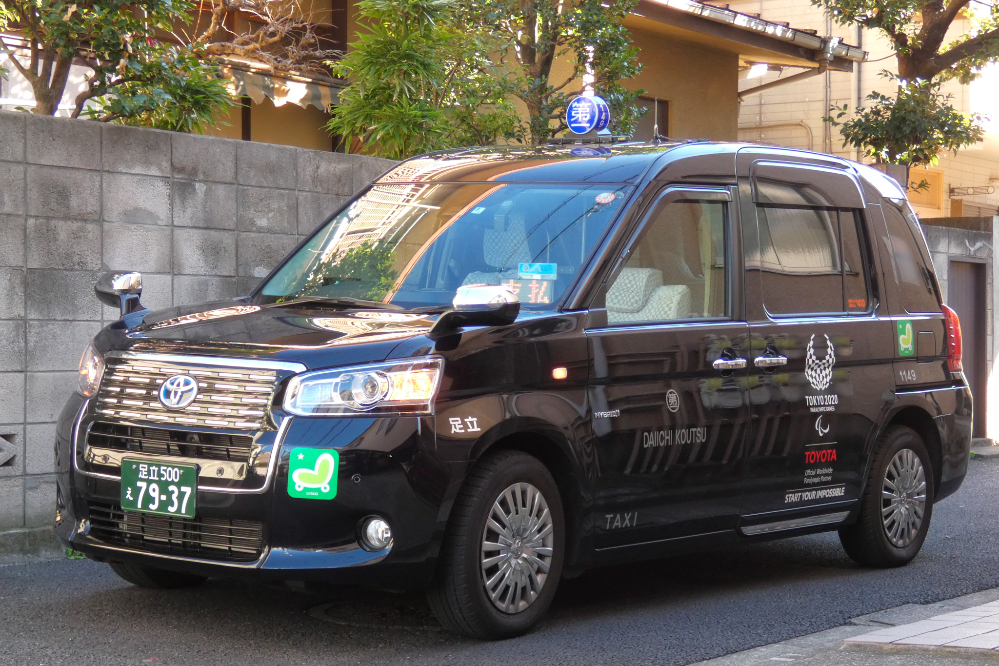 (足立)第一交通のJPN TAXI